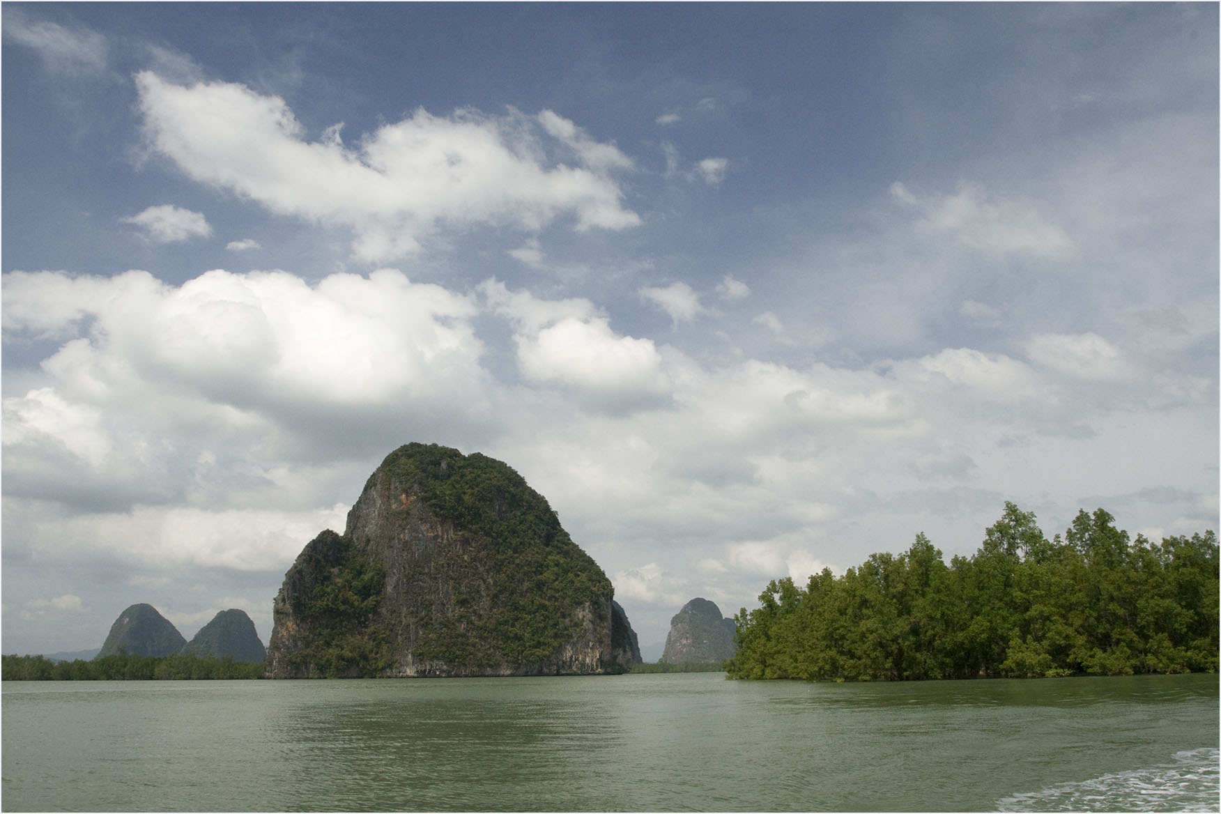 Phang-Nga Bay (อ่าวพังงา)